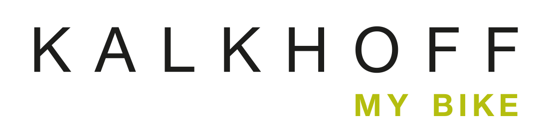 Kalkhoff Wortmarke mit Claim